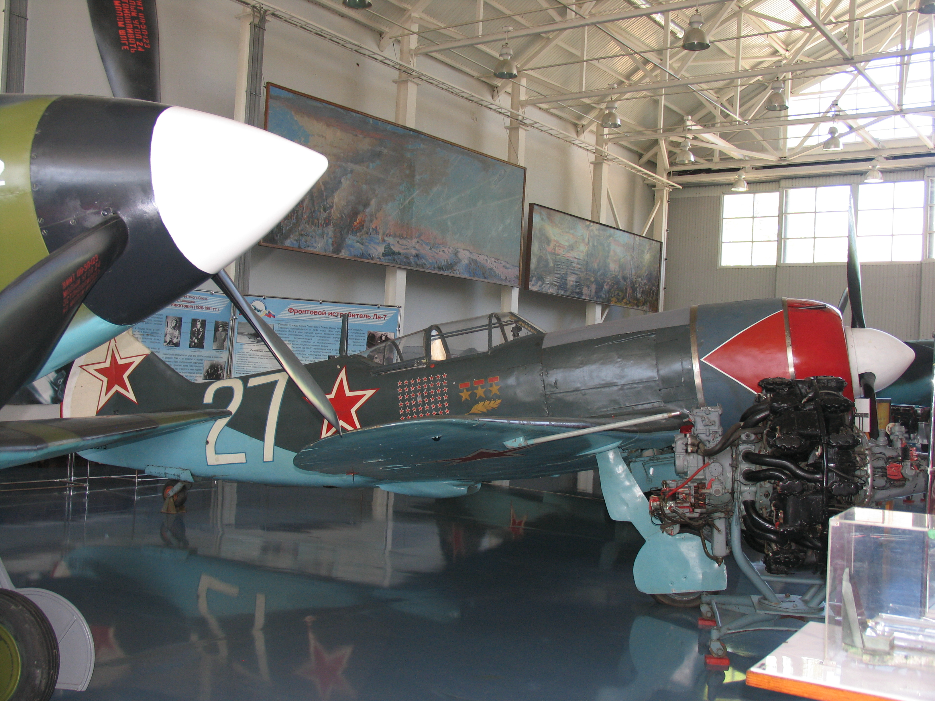 Ла-7 Трижды Героя СССР И. Н. Кожедуба. Музей ВВС.